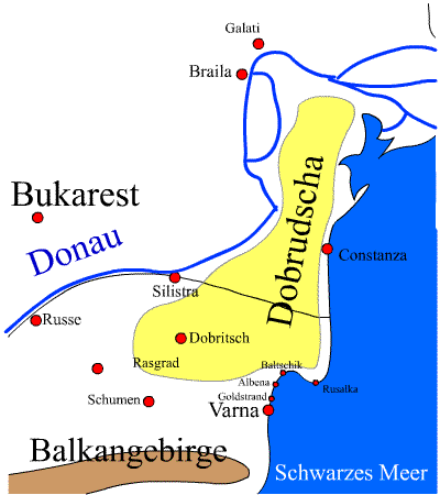 BGDobrudscha